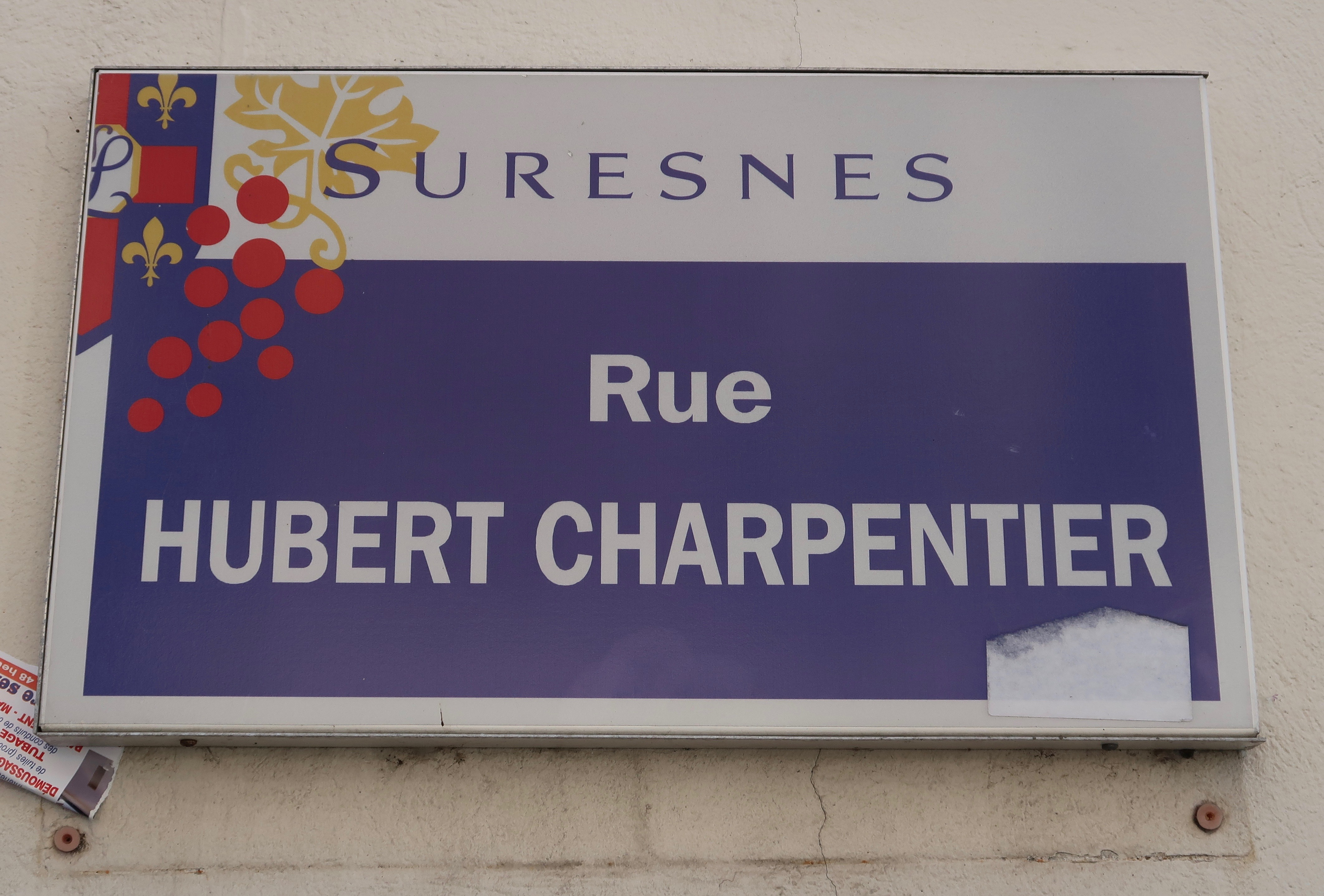 Plaque de la rue Hubert-Charpentier à Suresnes (Hauts-de-Seine).